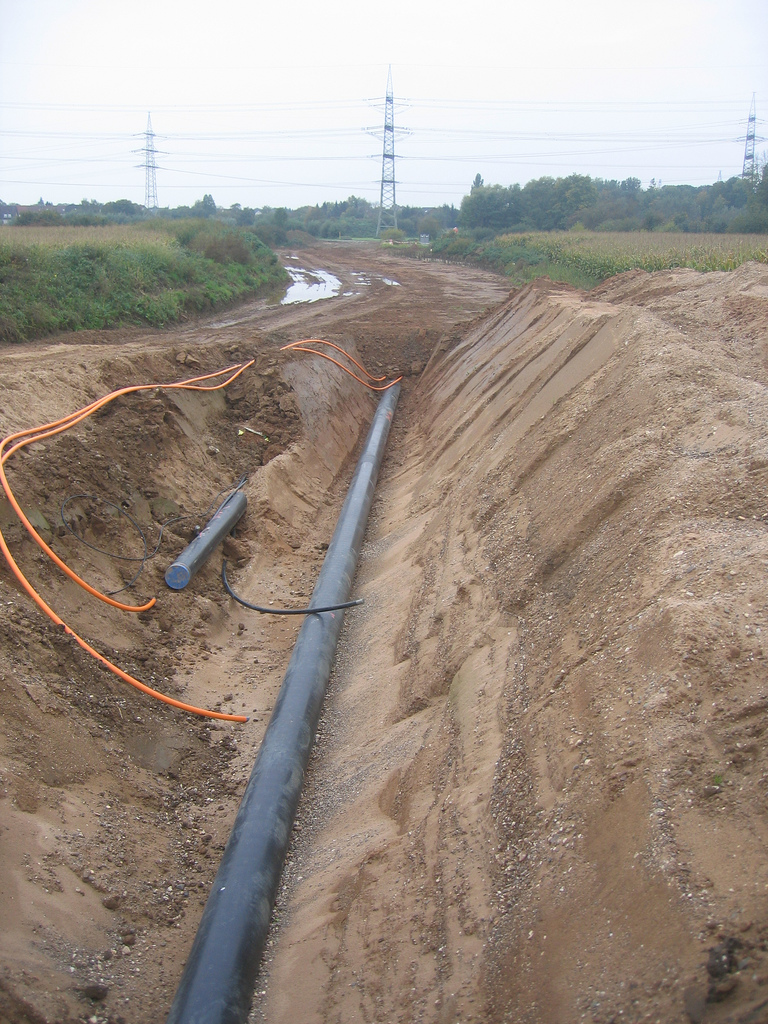 Bau der CO-Pipeline in Duisburg